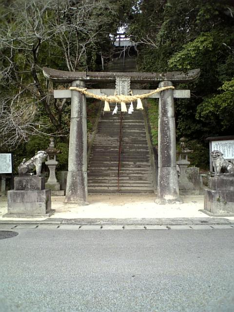 町指定文化財肥前鳥居